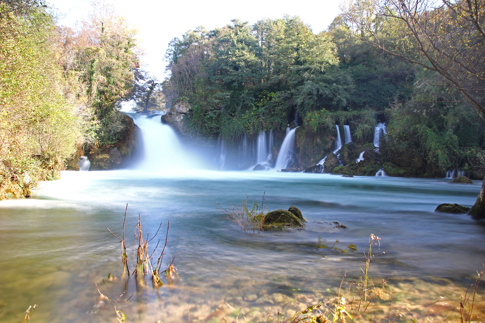 Sve boje Bilusica buk-a, Bilušića buk